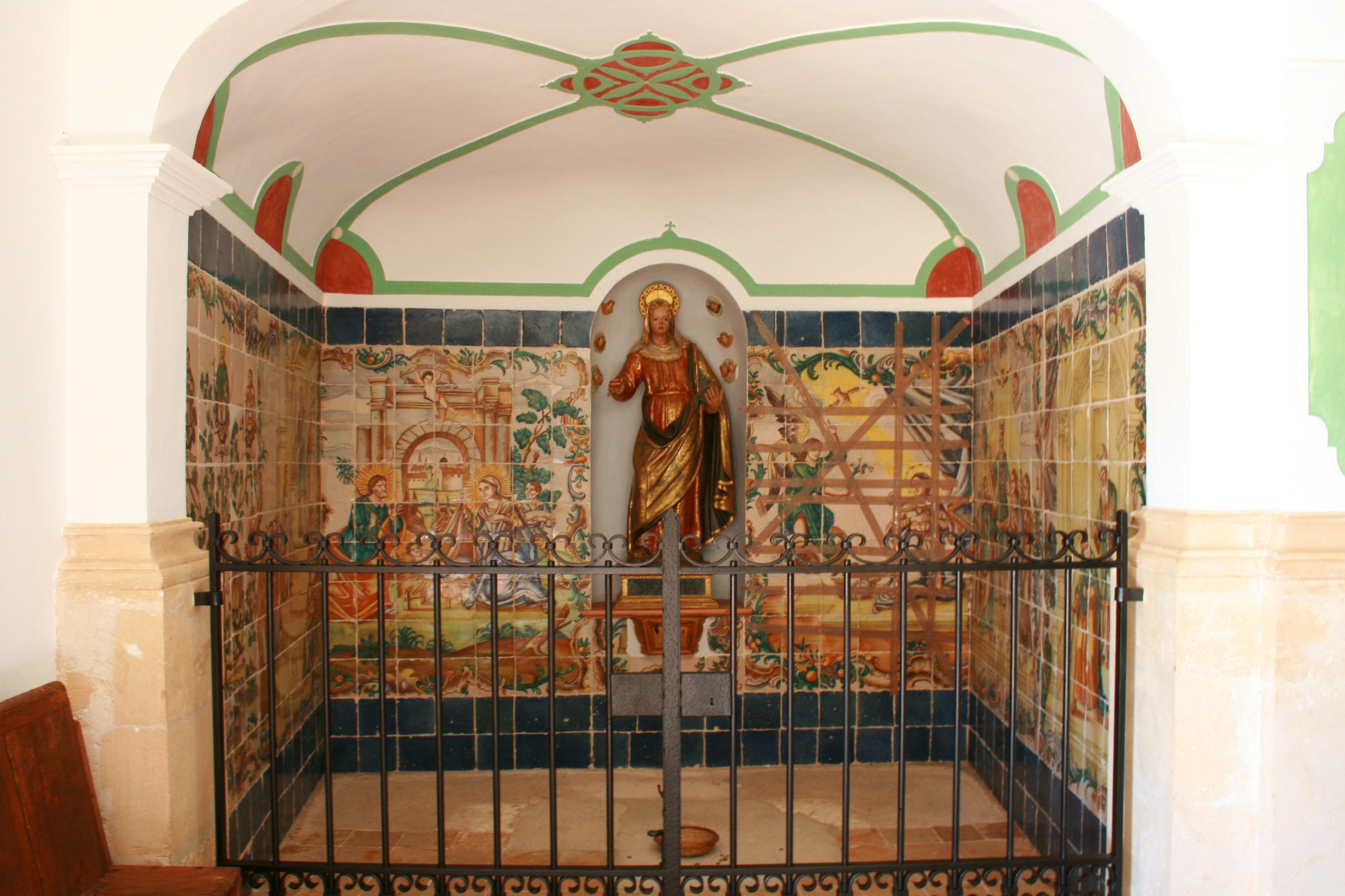 Santuari de Nostra Senyora de Gràcia, Puig de Randa in Algaida, Mallorca